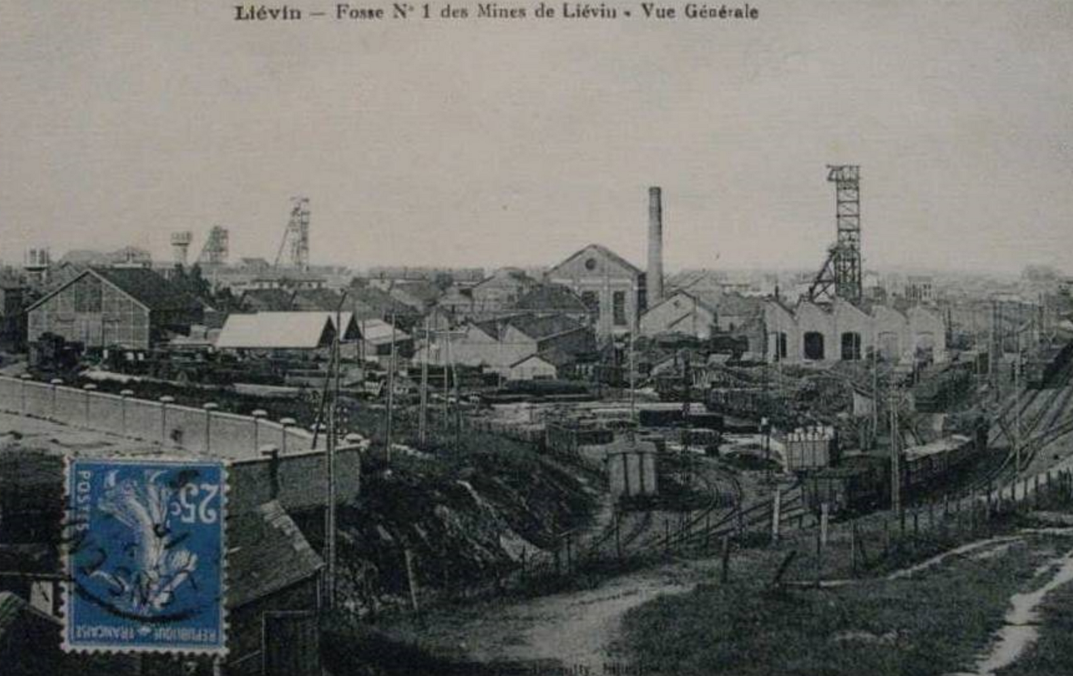 Fosse n° 1 - 1 bis - 1 ter de la Compagnie des mines de Liévin, Liévin, Pas-de-Calais, Nord-Pas-de-Calais, France.